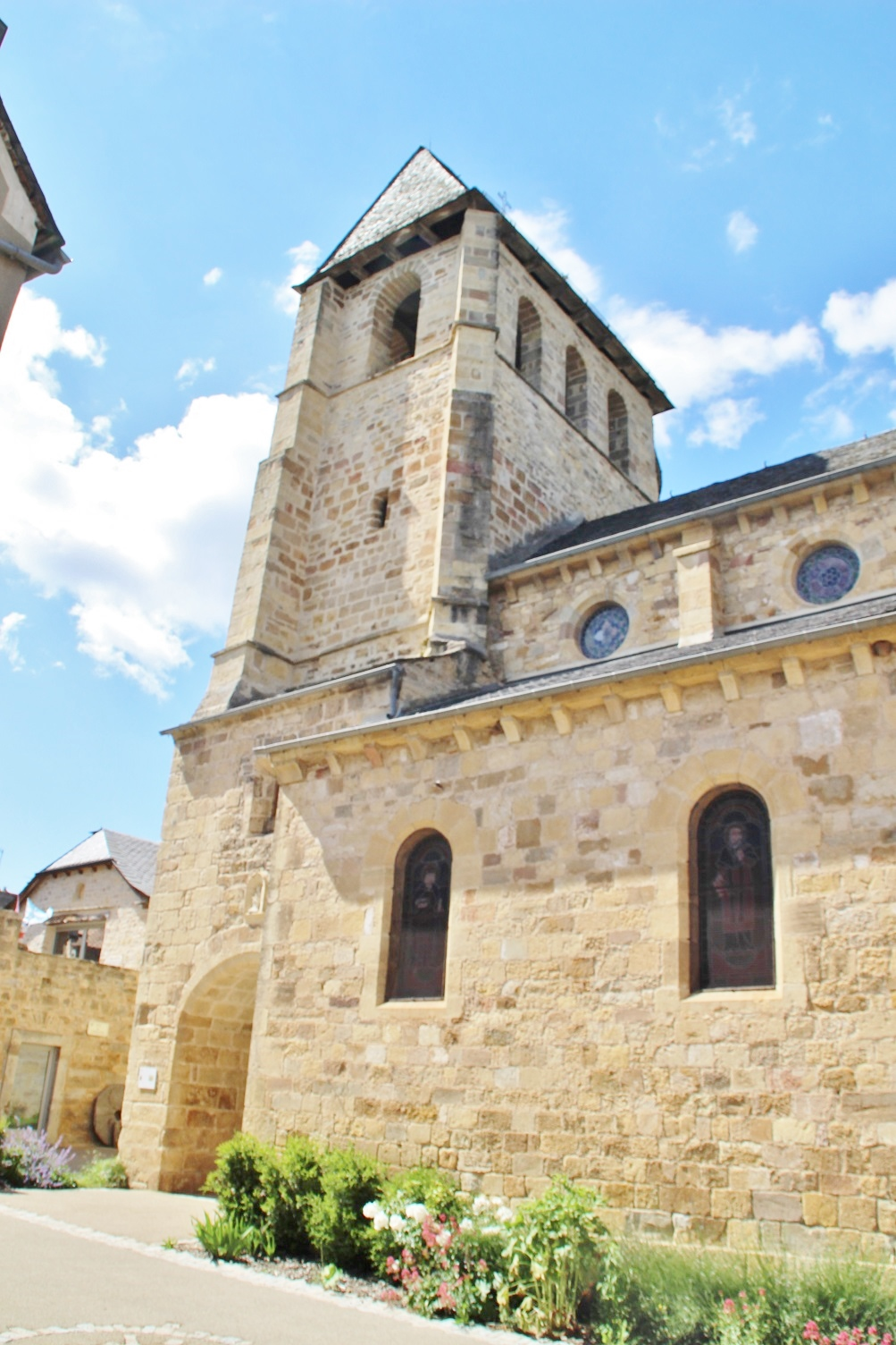 église Saint Julien